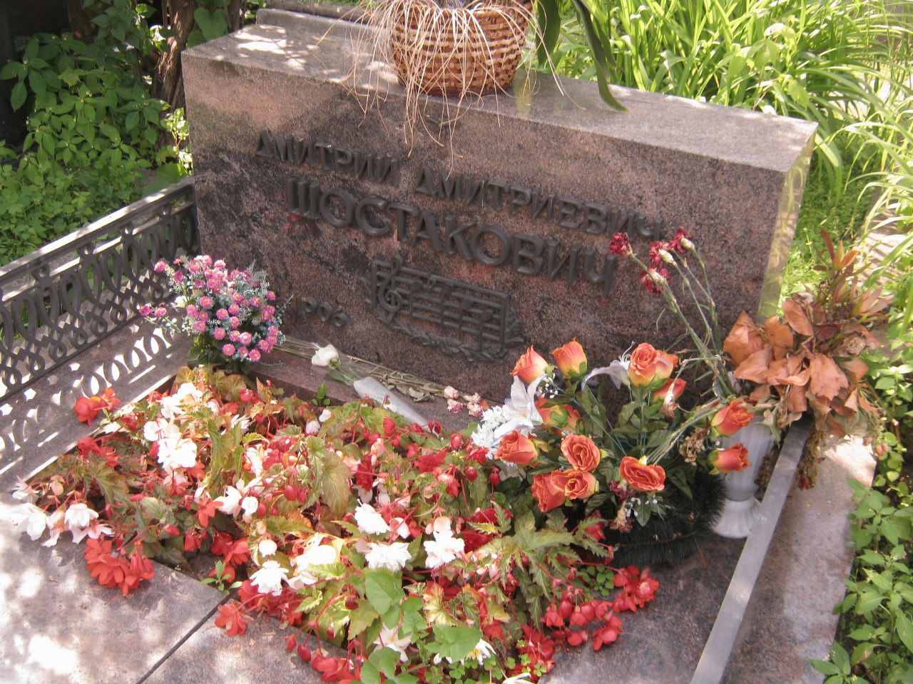 Могила Шостаковича Дмитрия Дмитриевича (1906-1975), композитора: Новодевичье кладбище, Хамовники, Центральный округ, Москва